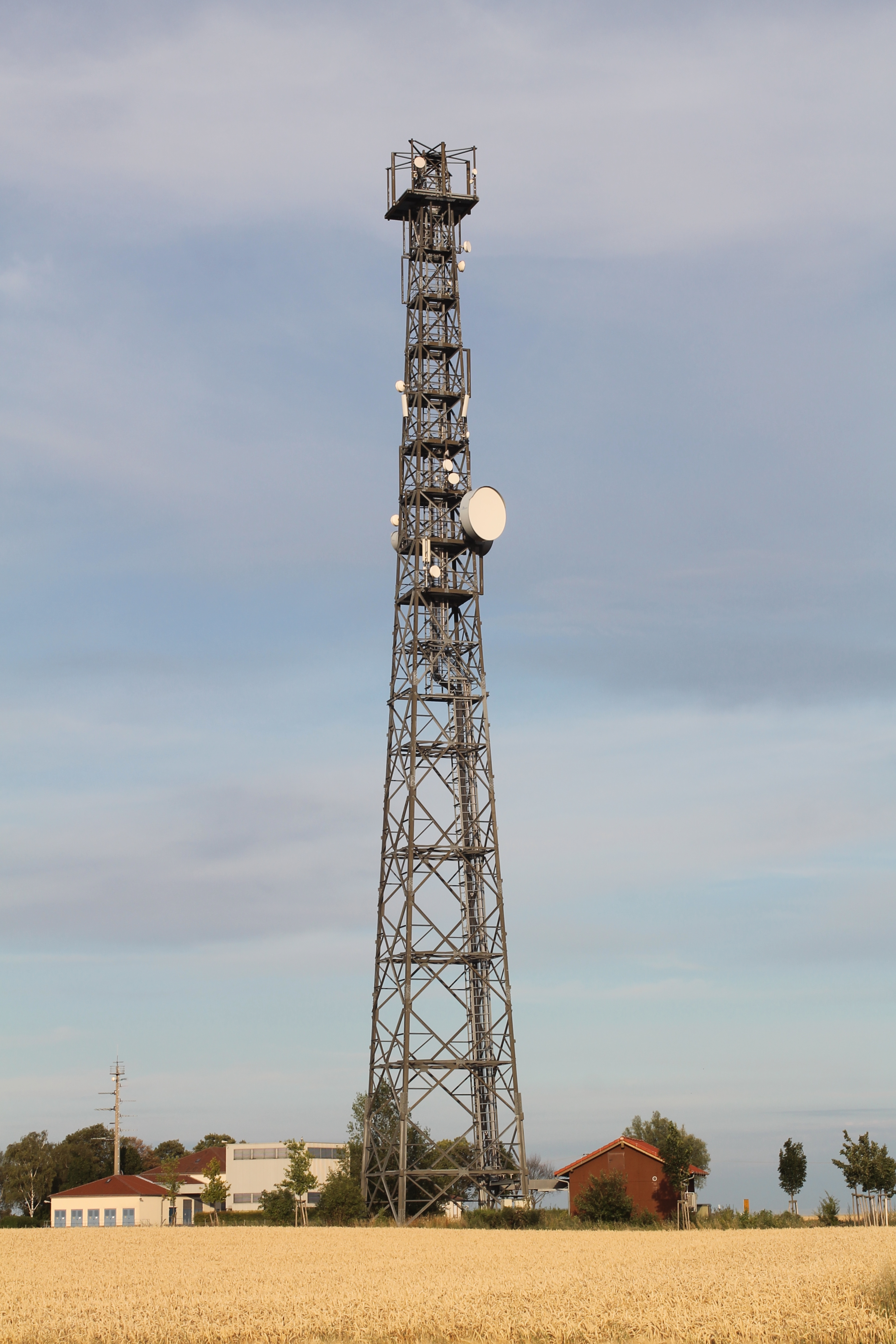 Mobilfunkturm beim Rheinsender